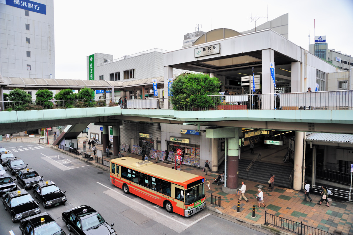 藤澤車站